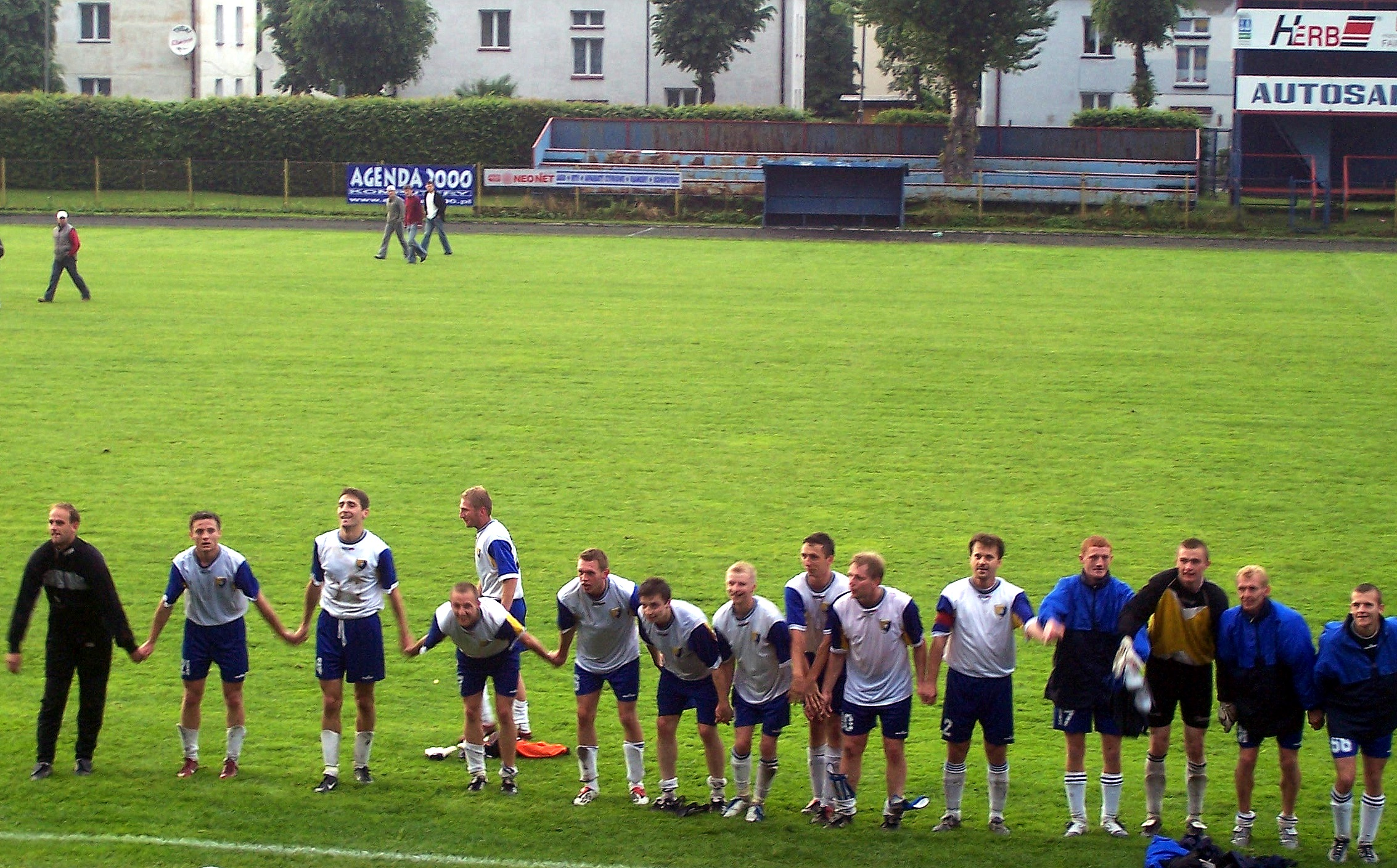 Stal Sanok (11.06.2005)